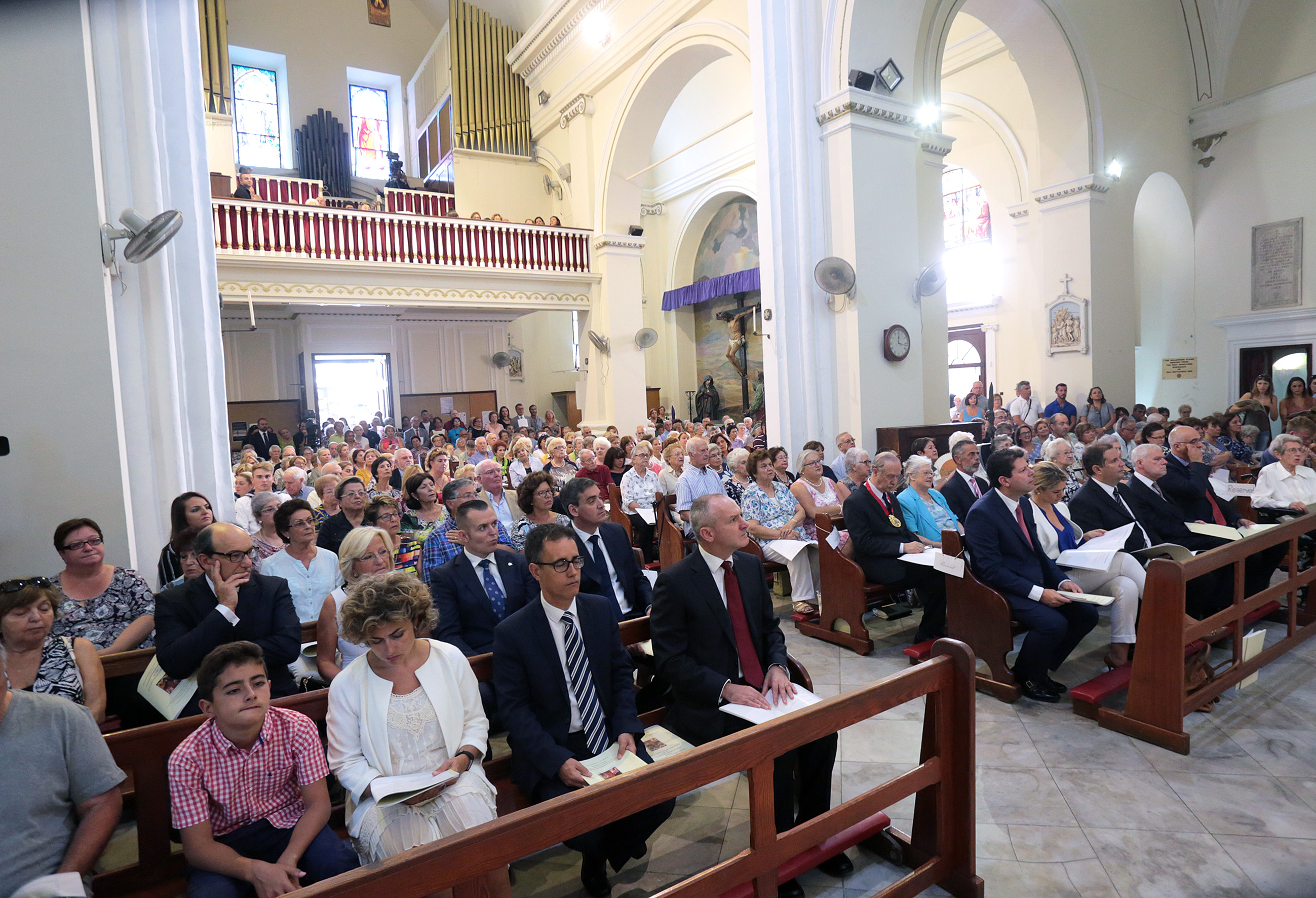 24-Sep-2016 Toma de posesión de Carmelo Zammit del cargo de Obispo de Gibraltar en la Catedral católica de Santa María la Coronada. Tras la procesión de obispos y sacerdotes por la Calle Real hasta una Catedral abarrotada con las puertas totalmente abiertas (no cerradas, como era costumbre) allí se encontró con el Obispo Heskett, administrador apostólico y el rector de la Catedral, Monseñor Paul Bear. A la ceremonia de toma de posesión y eucaristía asistieron, entre otros, el Ministro Principal de Gibraltar, Fabián Picardo, y el Gobernador de Gibraltar, Ed Davis. Además, asistió en representación del gobierno maltés el Ministro Stefan Buontempo, ya que en Malta fue ordenado Zammit Obispo de Gibraltar. Otras personalidades en el evento: Daniel Feetham, líder de la oposición parlamentaria, el portavoz del Parlamento y Alcalde de Gibraltar,Adolfo Canepa, el Viceministro Principal, Joseph García, el Ministro Joe Bossano y el ex Ministro Principal, Peter Caruana